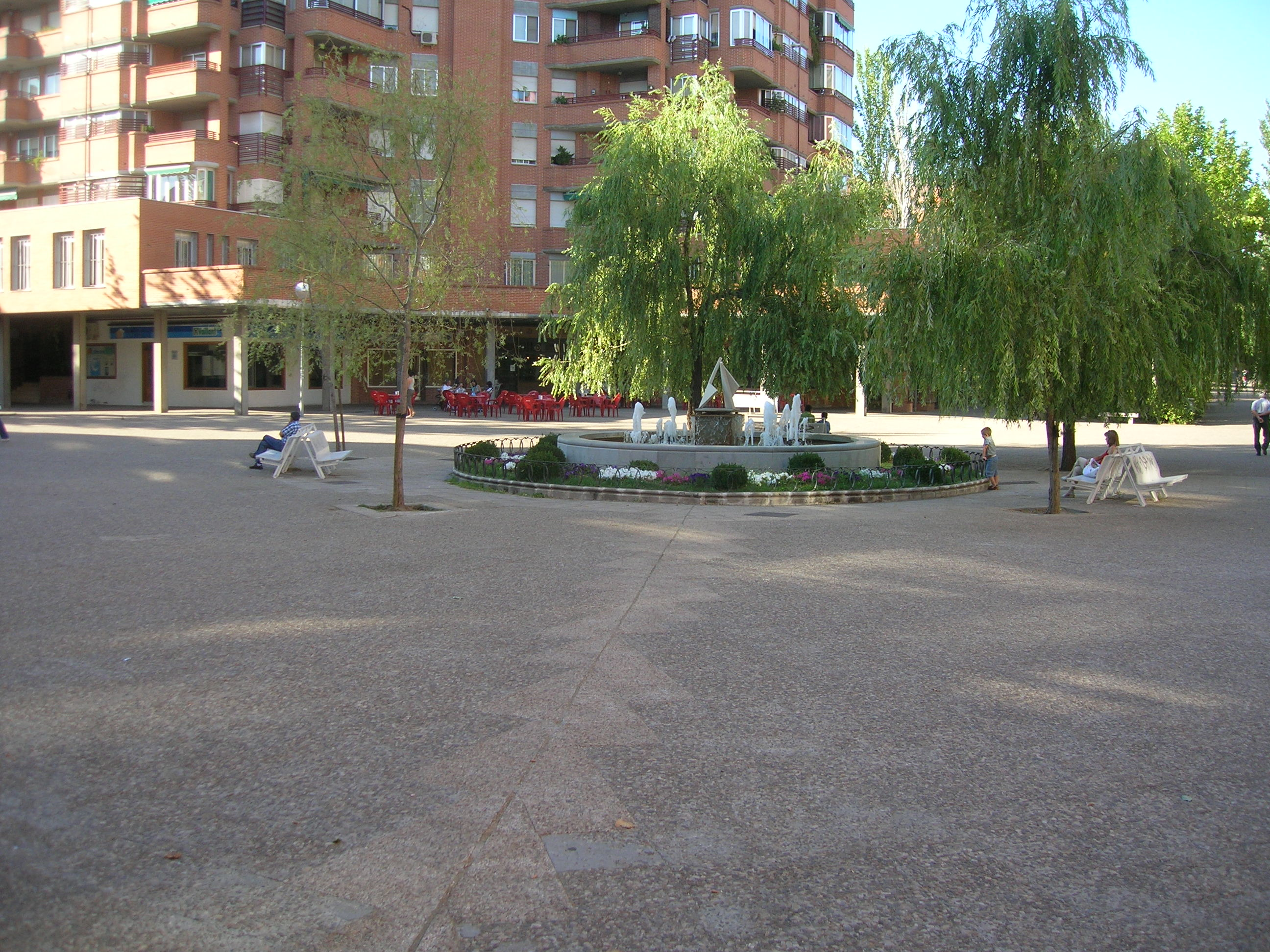 Sector de los Oficios (Plaza del Cartero Rural)